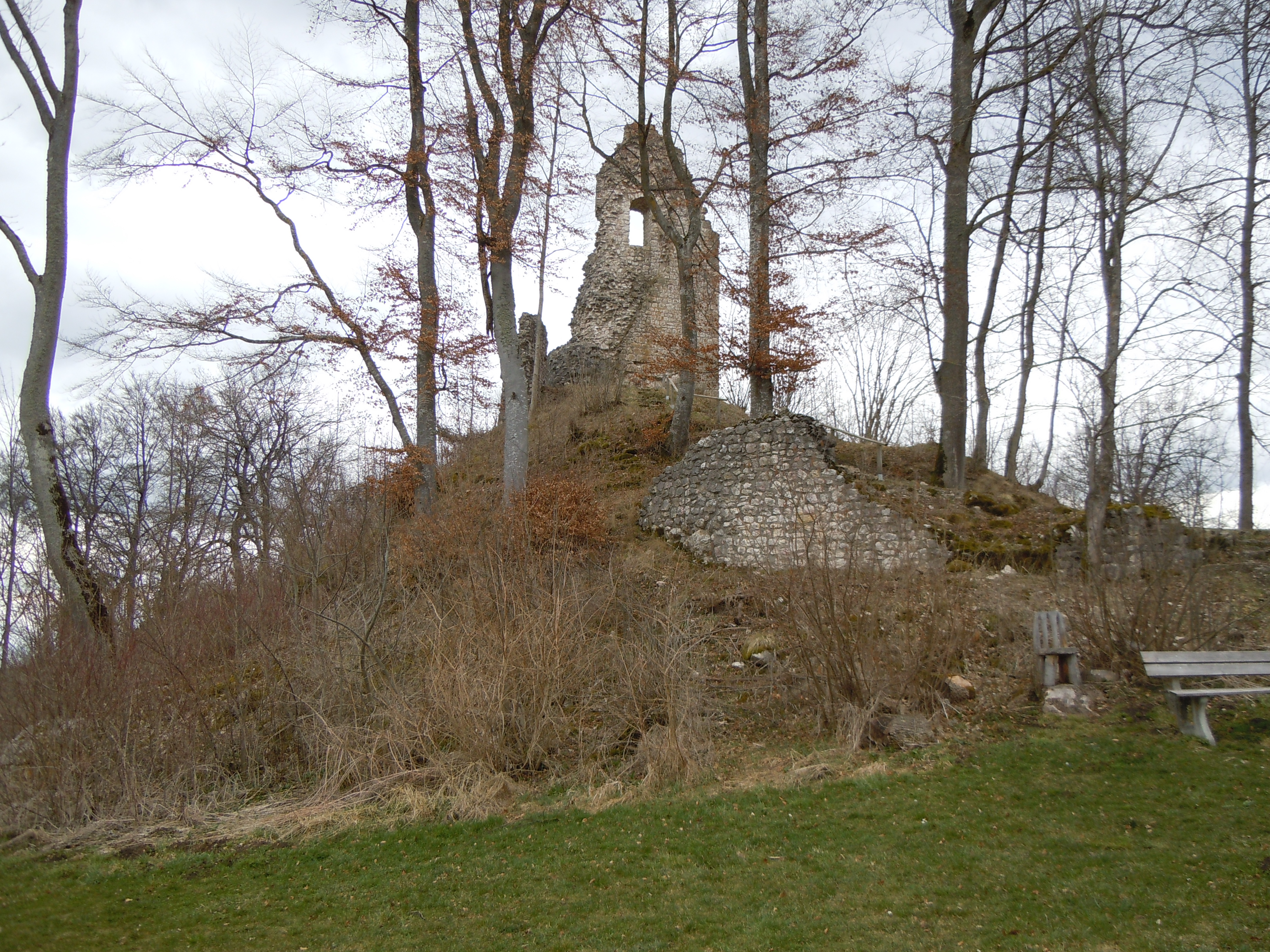 Blick von der Vorburg zum Bergfried.